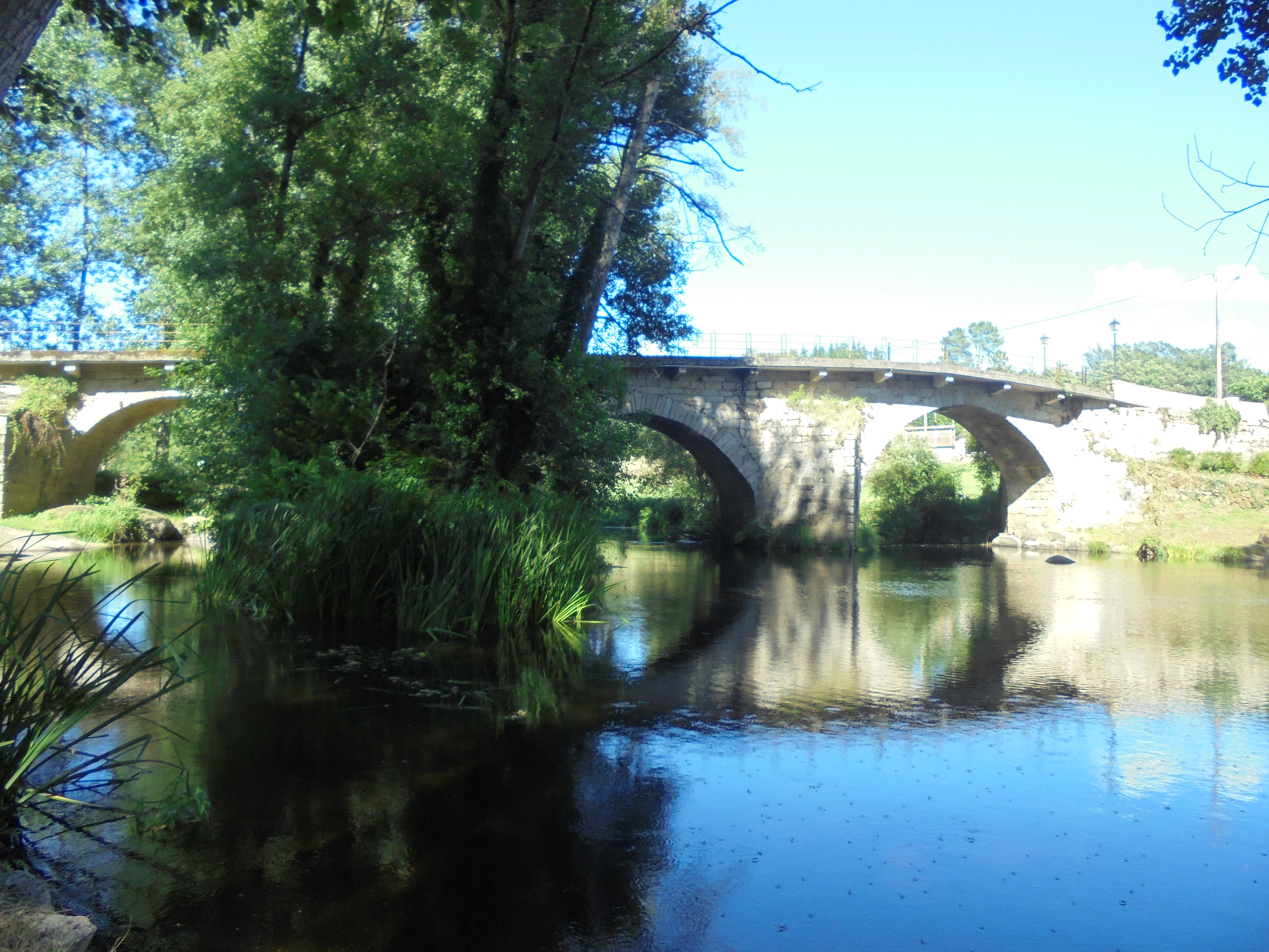 A Ponte de Neira ( O Corgo)